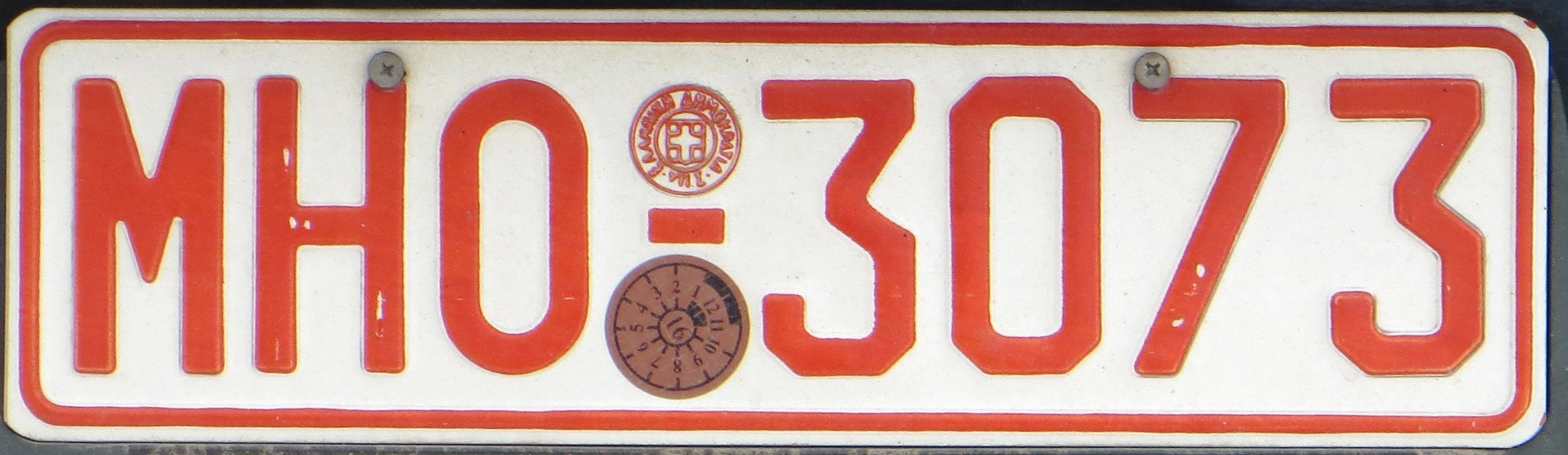 Grieks kentekenplaat concessionary